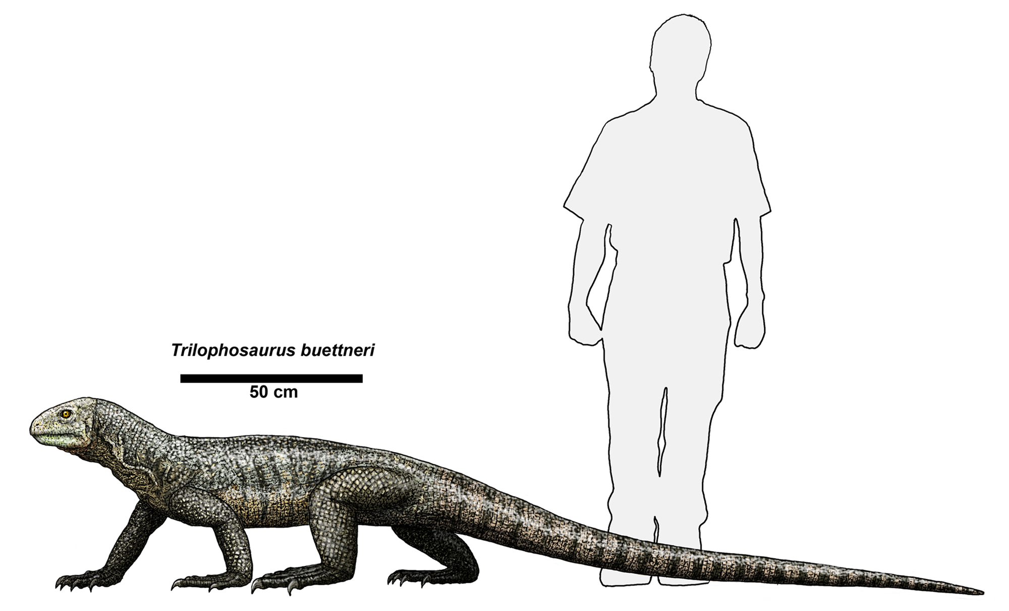 Credit Dr. Jeff Martz/NPS